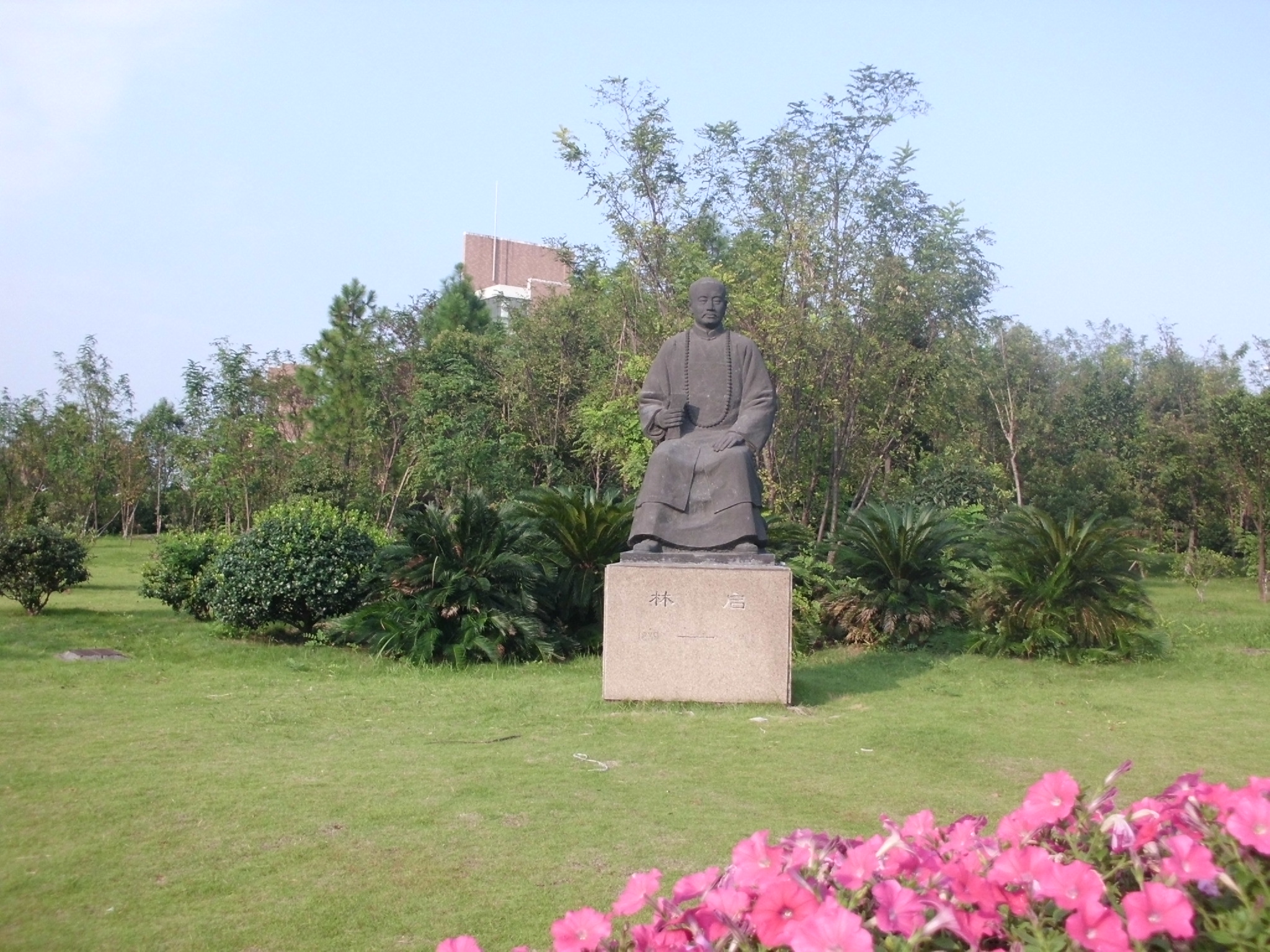 学校创始人林启像